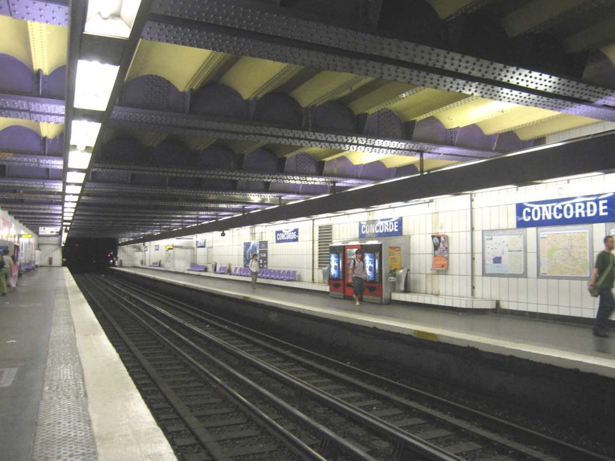 Metro de Paris Ligne 8 station Concorde Lieu : Paris, France Date : Juin 2006 Auteur : Pline photo personnelle